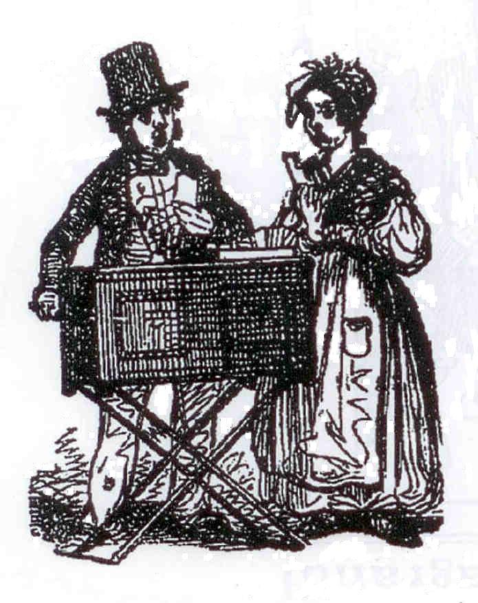 Un orgue de barbarie et deux chanteurs des rues de Paris. Le livre dont est tiré cette image est édité chez B. Renaud à Paris.